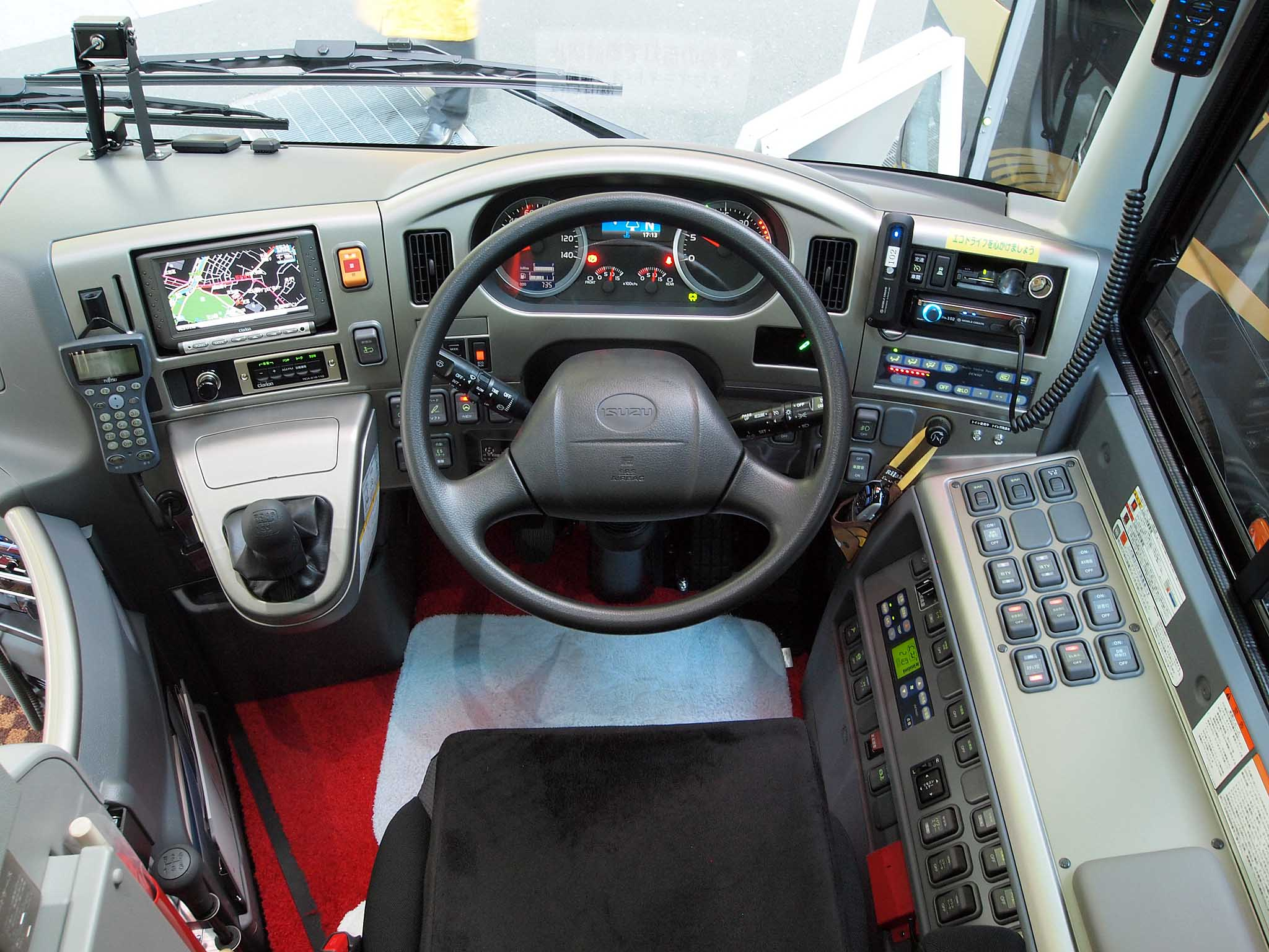 2014年4月より就役する、はとバスの自社主催ツアー専用車「ピアニシモIII」の運転席。 型式：QPG-RU1ESBJ 登録番号：品川230あ・412 はとバス創立65周年記念イベントにて展示